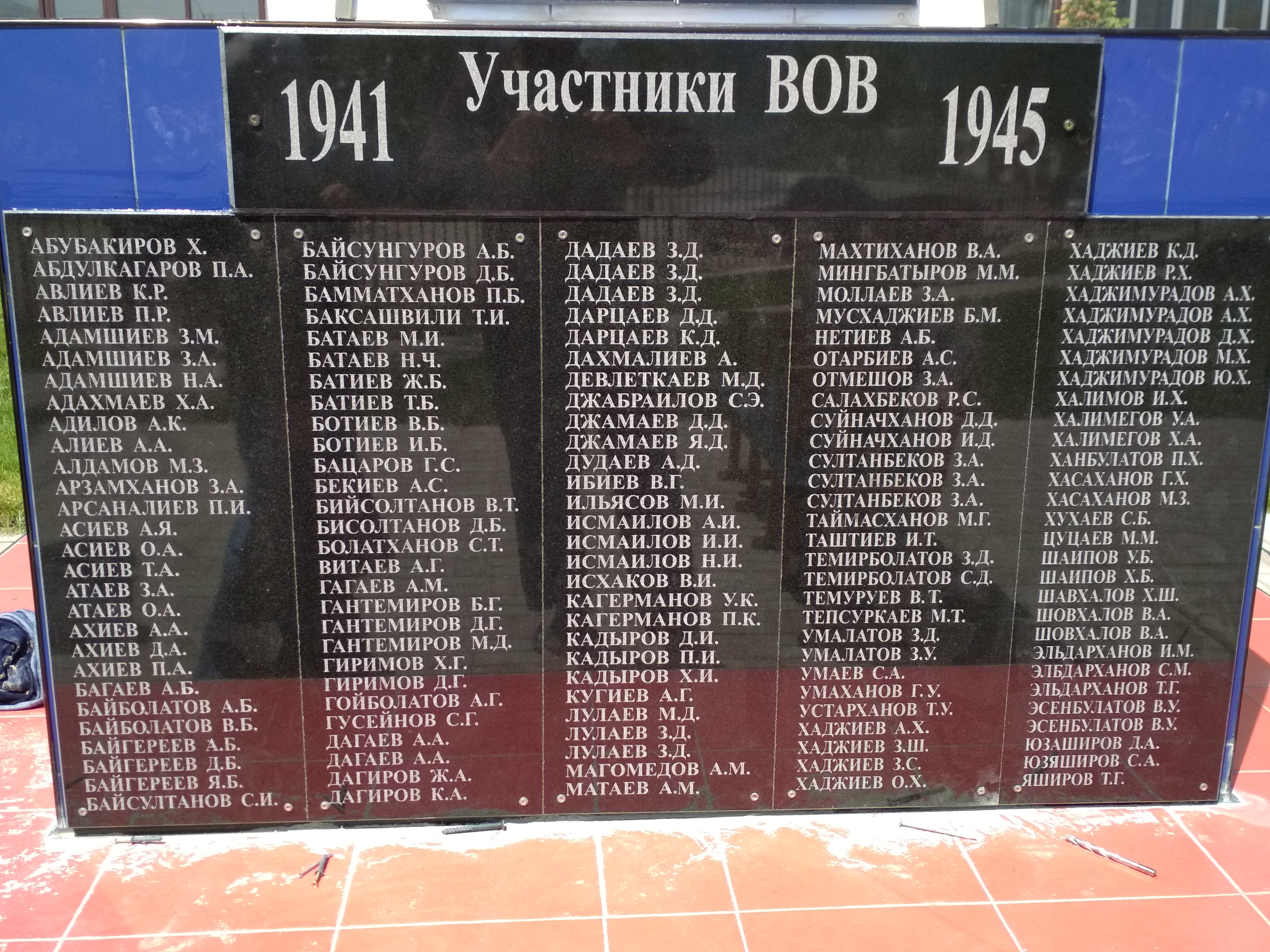 Участники ВОВ с Юрт-Ауха